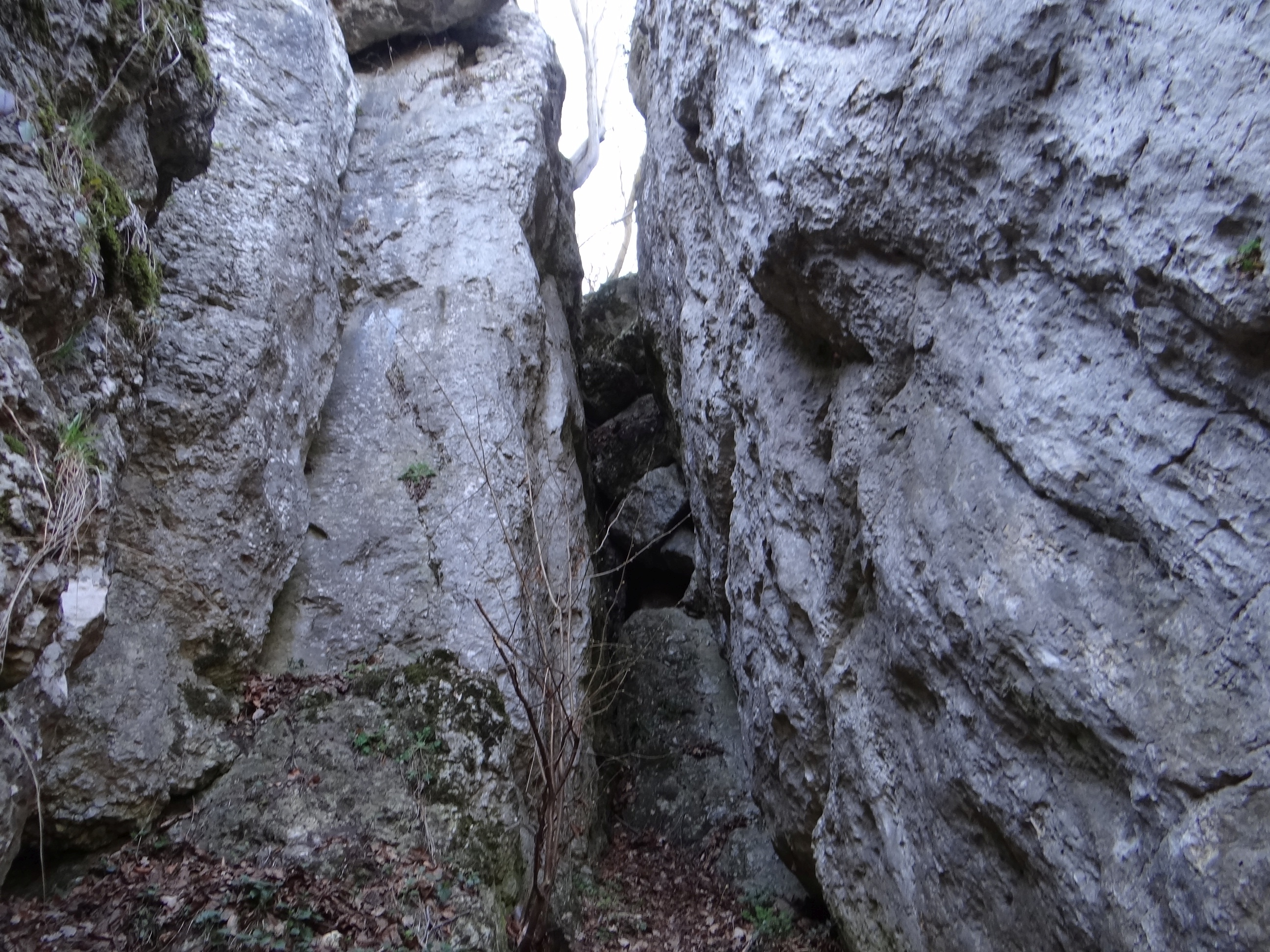 Skała Obchodnia w Dolinie Brzoskwinki